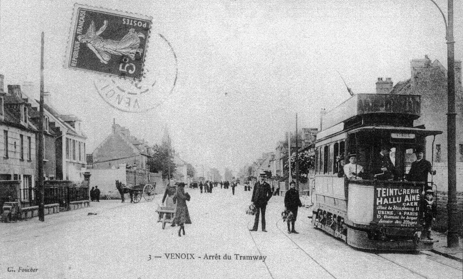 Avenue Henri Chéron à Venoix, Caen (14), au début du 20ème siècle